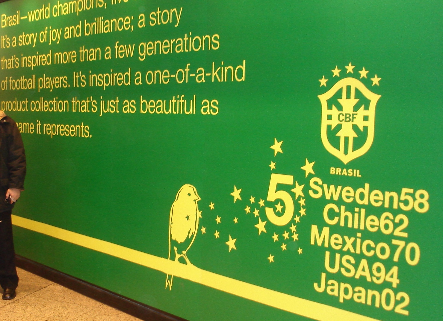 Painel comemorativo dos campeonatos mundiais da seleçǎo brasileira, loja da Nike em Londres